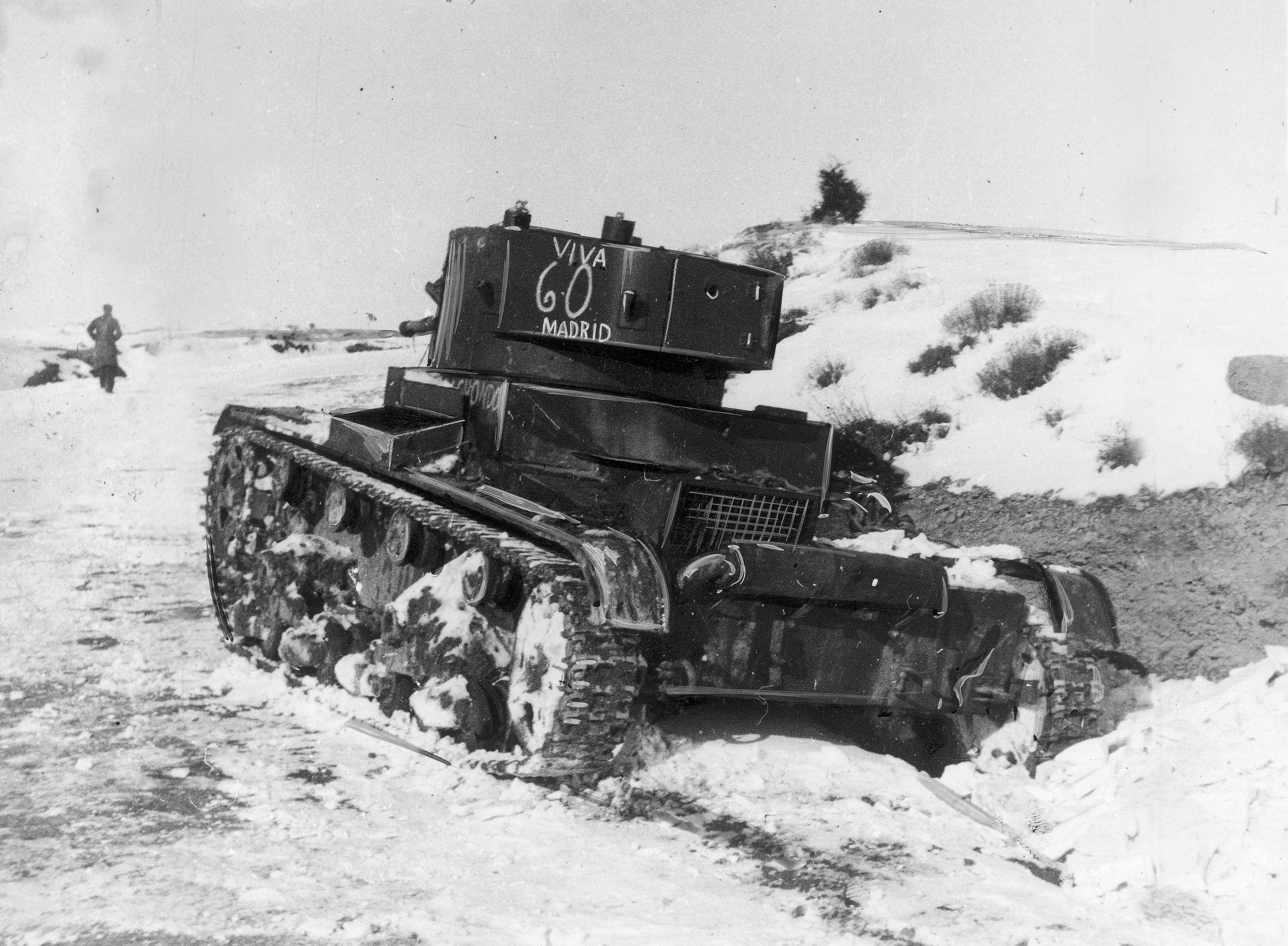 Tanque republicano T-26 durante la Batalla de Teruel. This is a retouched picture, which means that it has been digitally altered from its original version. Modifications: Minor background imperfection fixes using Photoshop CS6.